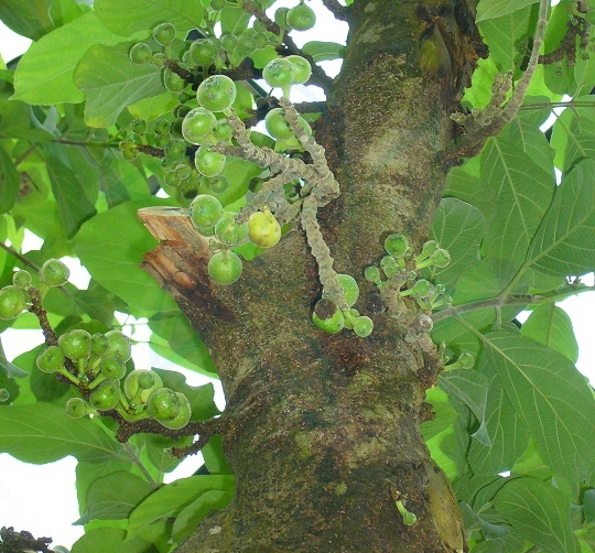 对叶榕